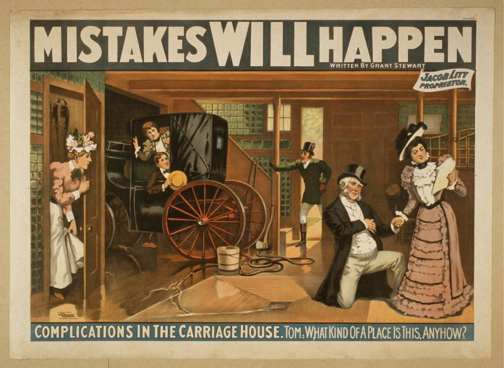 Tableau d'une remise